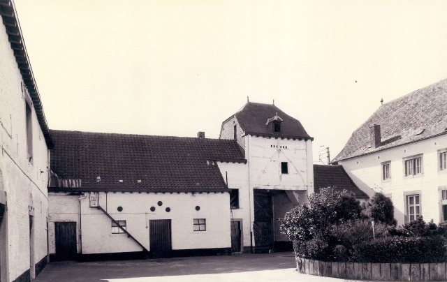 Borgloon Jesserenstraat 83